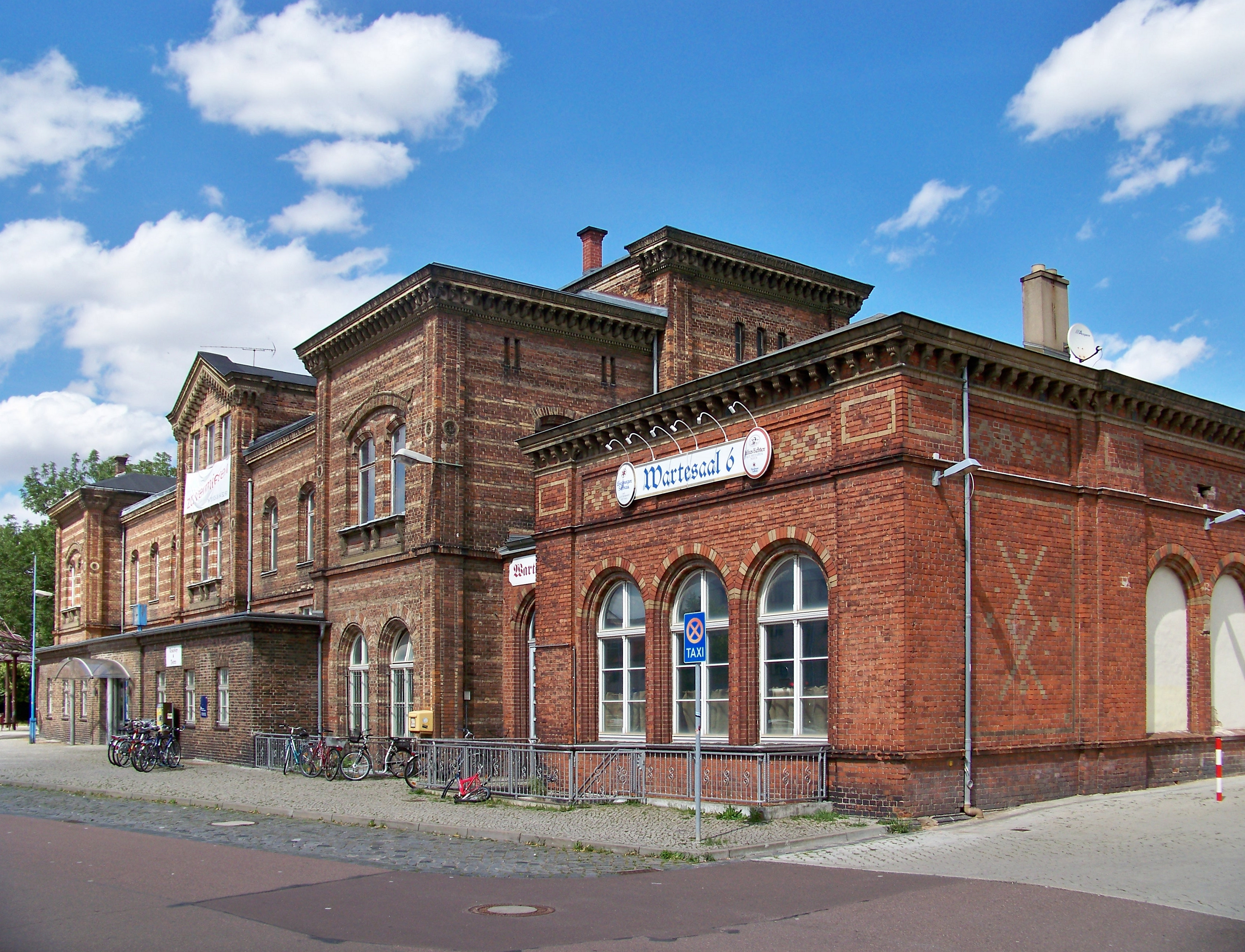 Empfangsgebäude des Bahnhofs Bernburg (Saale)